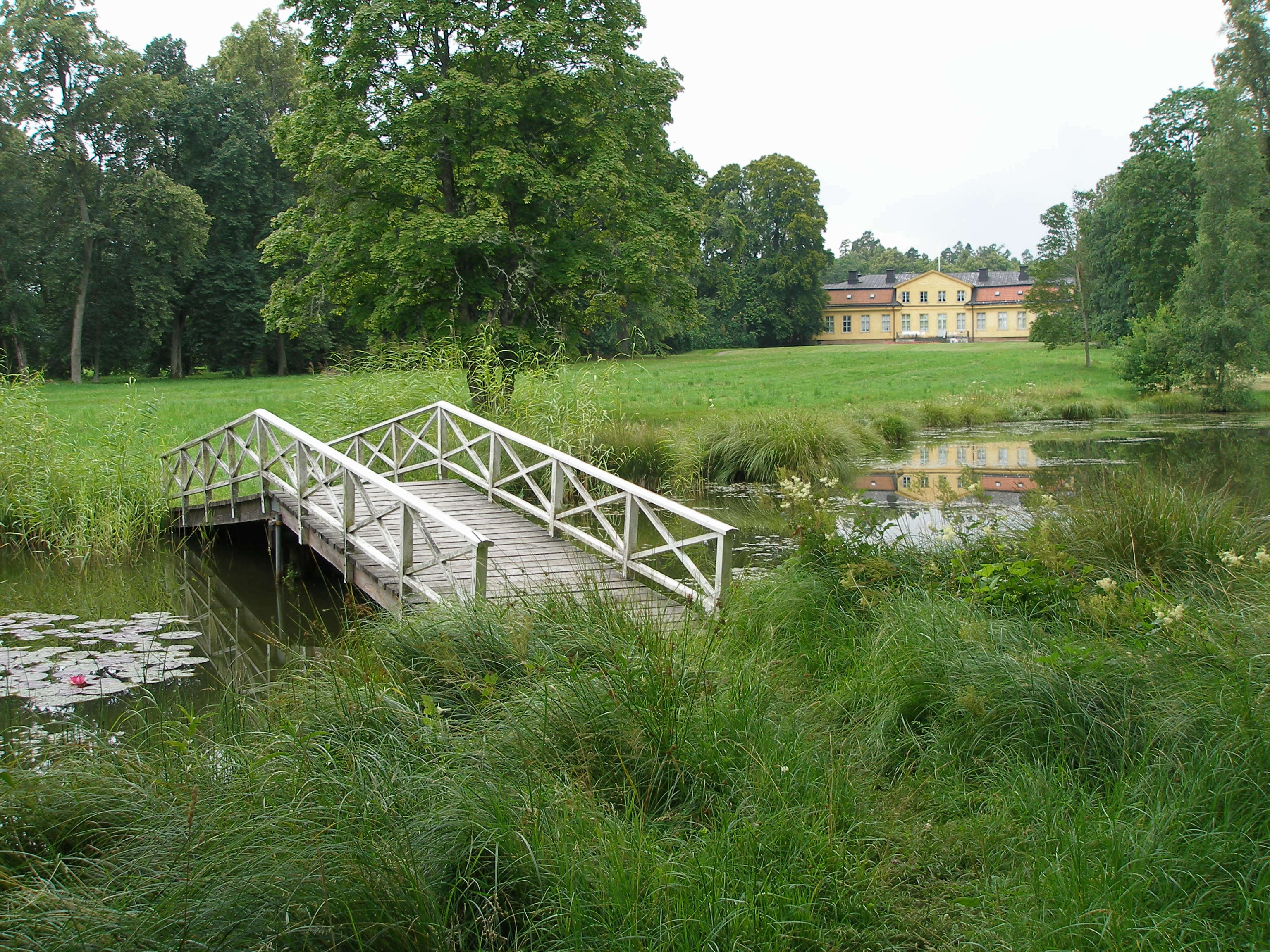 Lambohov slott från baksidan